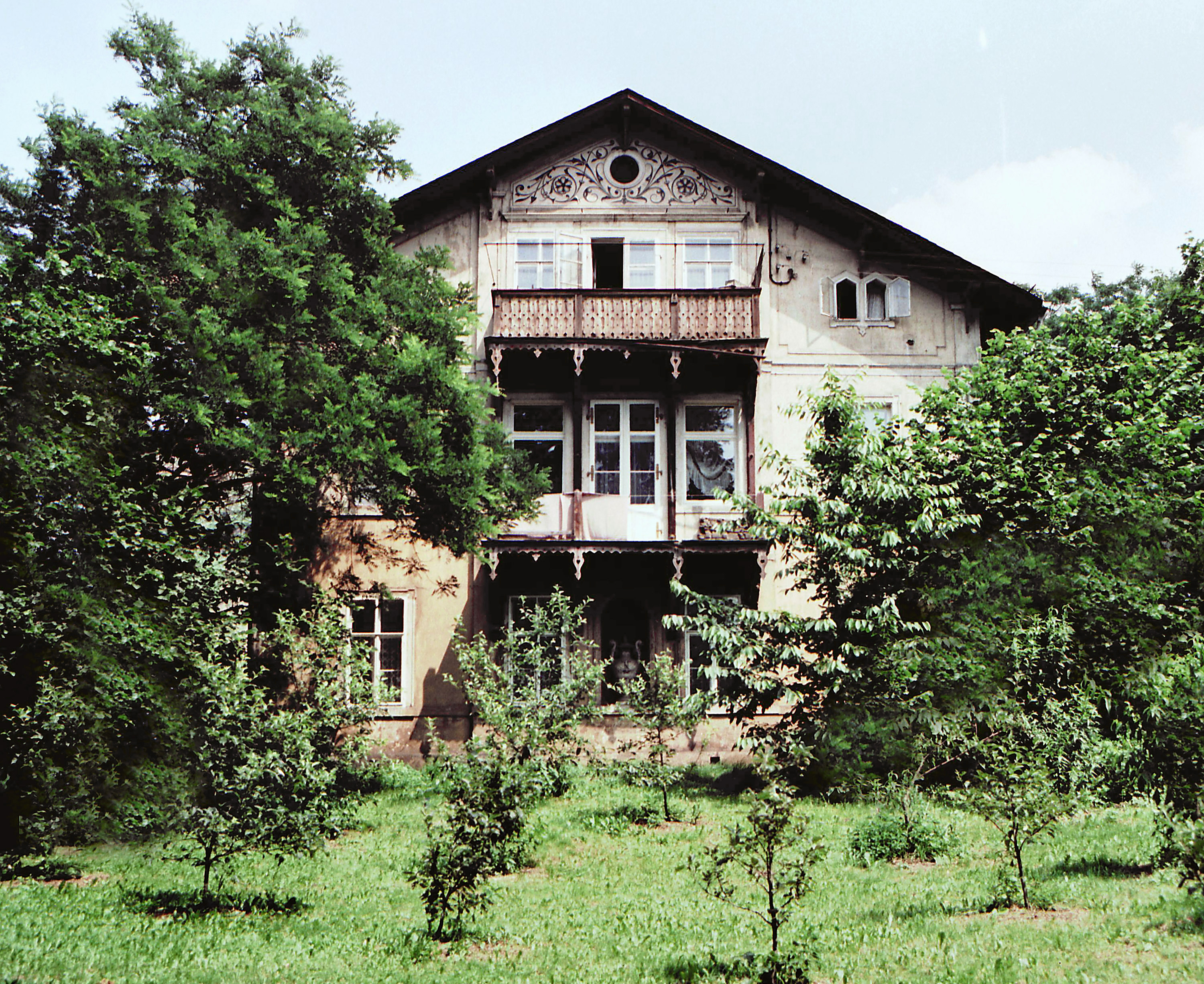 11.07.1987 8122 [01445] Radebeul: Weinbergstraße 26: "Villa Jordan", erbaut 1866 von Baumeister Moritz Ziller. Typisches Beispiel des Neorenaissance-Landhausstils der Lößnitz. [R19870711A01.JPG]19870711400NR.JPG(c)Blobelt